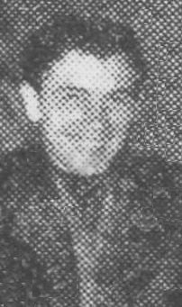 Georges Firmin, en mars 1942 à 18 ans (Paris)